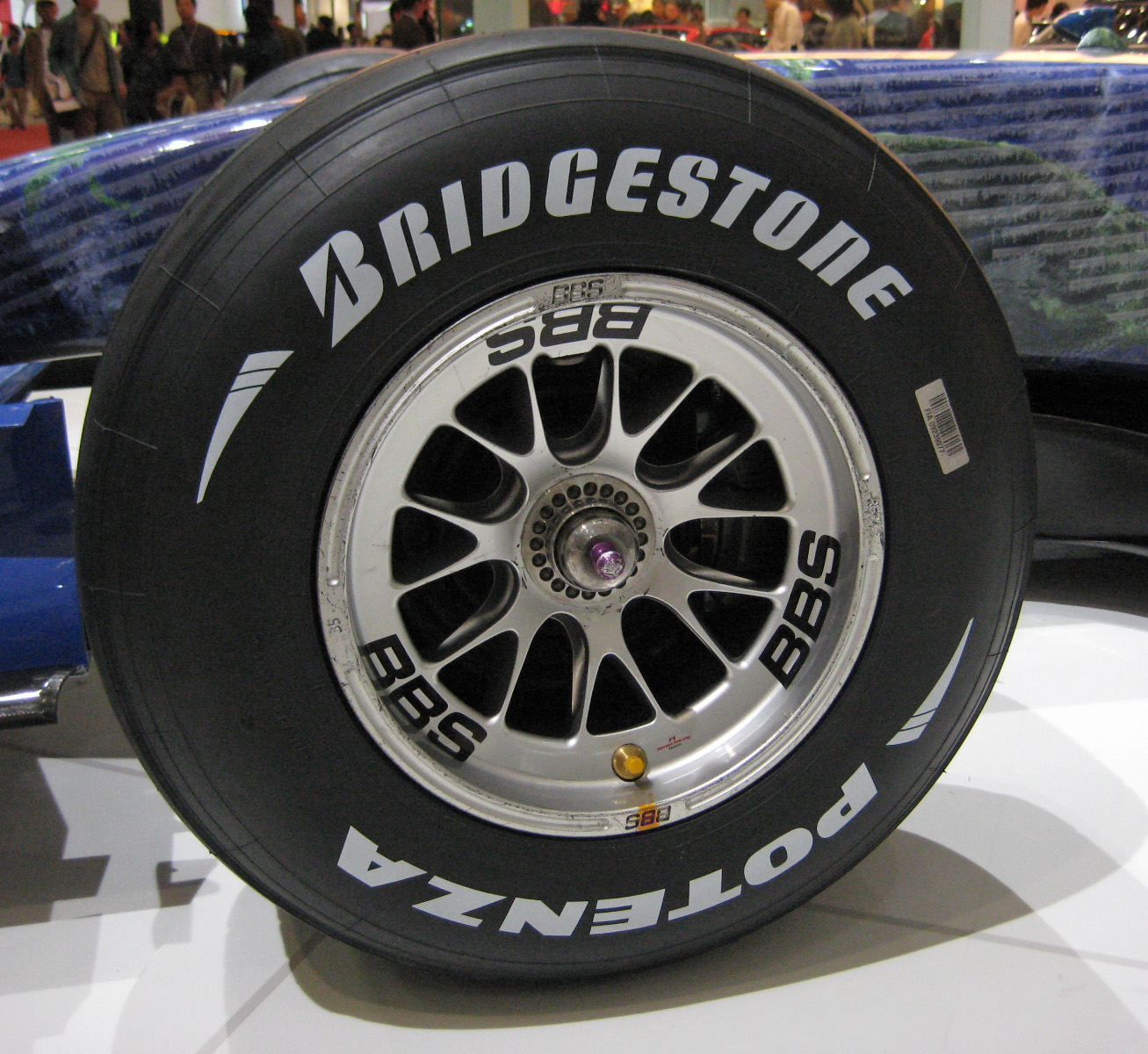 Bridgestone Potenza F1 Front Tire and BBS Wheel on Honda RA107